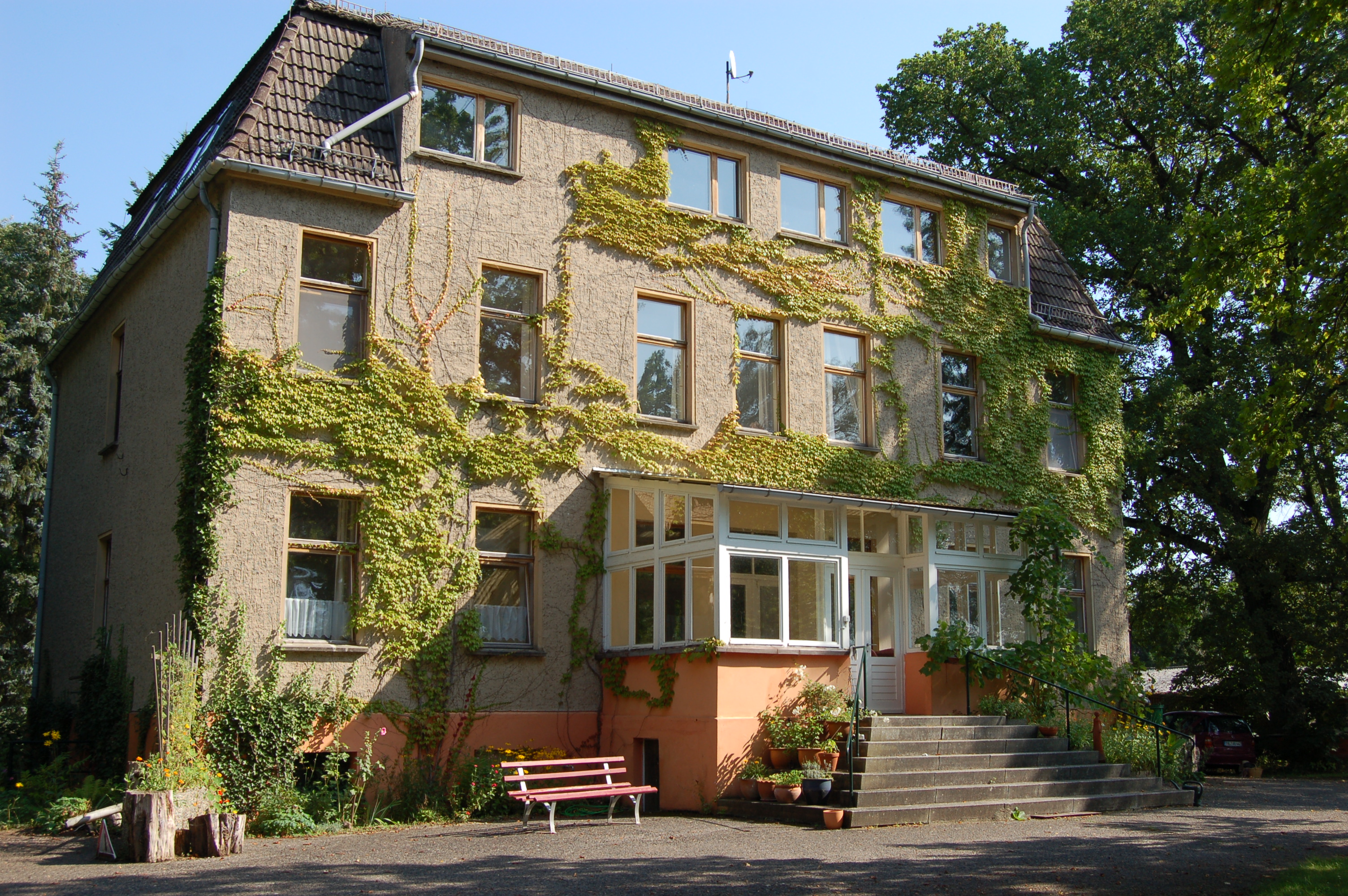 Der ehemalige Mühlenhof 2012